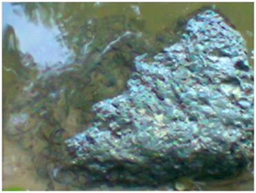 মাশাজান দীঘির আলোচনা সম্পর্কিত কিছু ছবি।